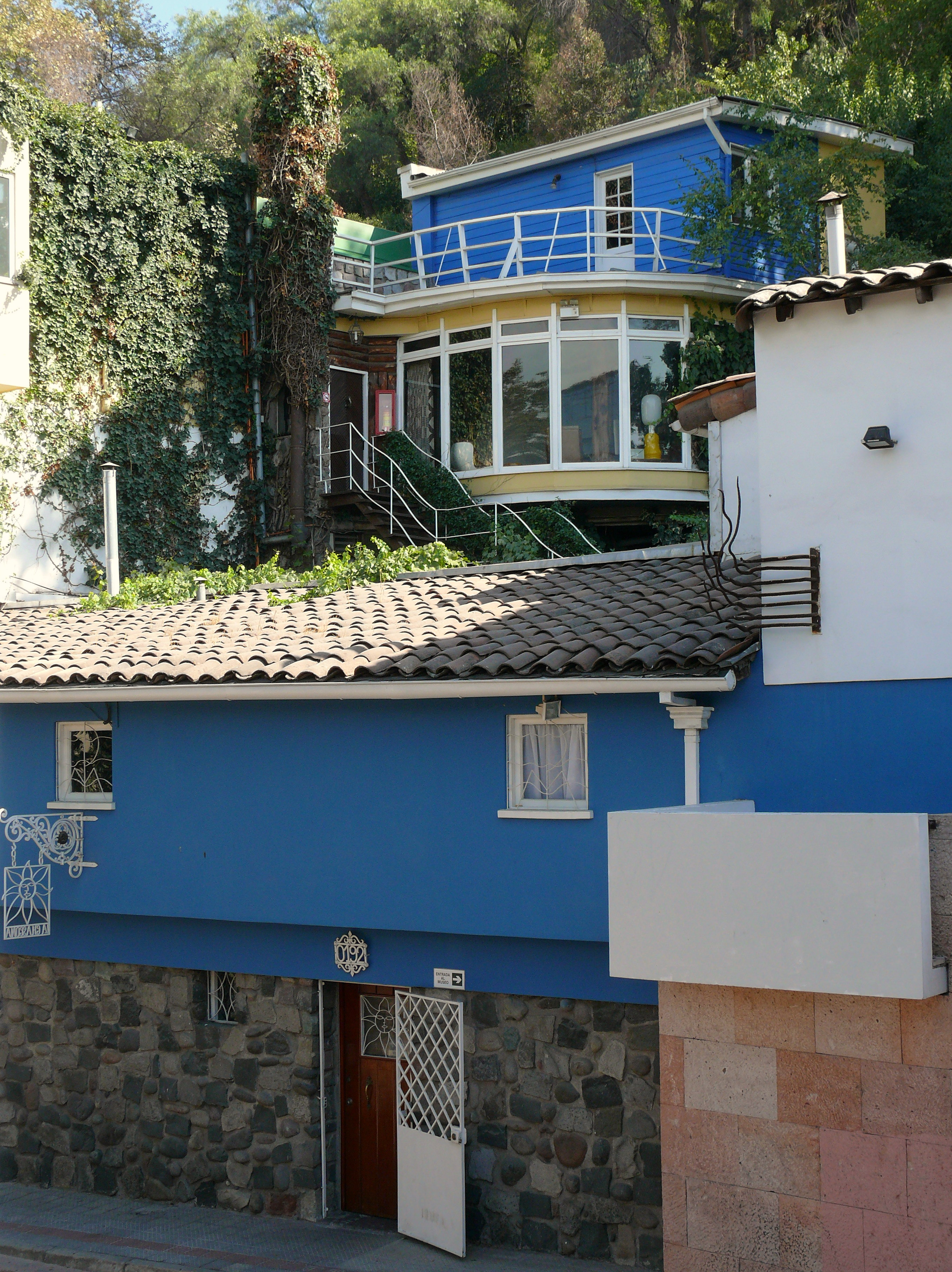 Vista de la casa de Pablo Neruda "La Chascona" This is a photo of a national monument in Chile: 874